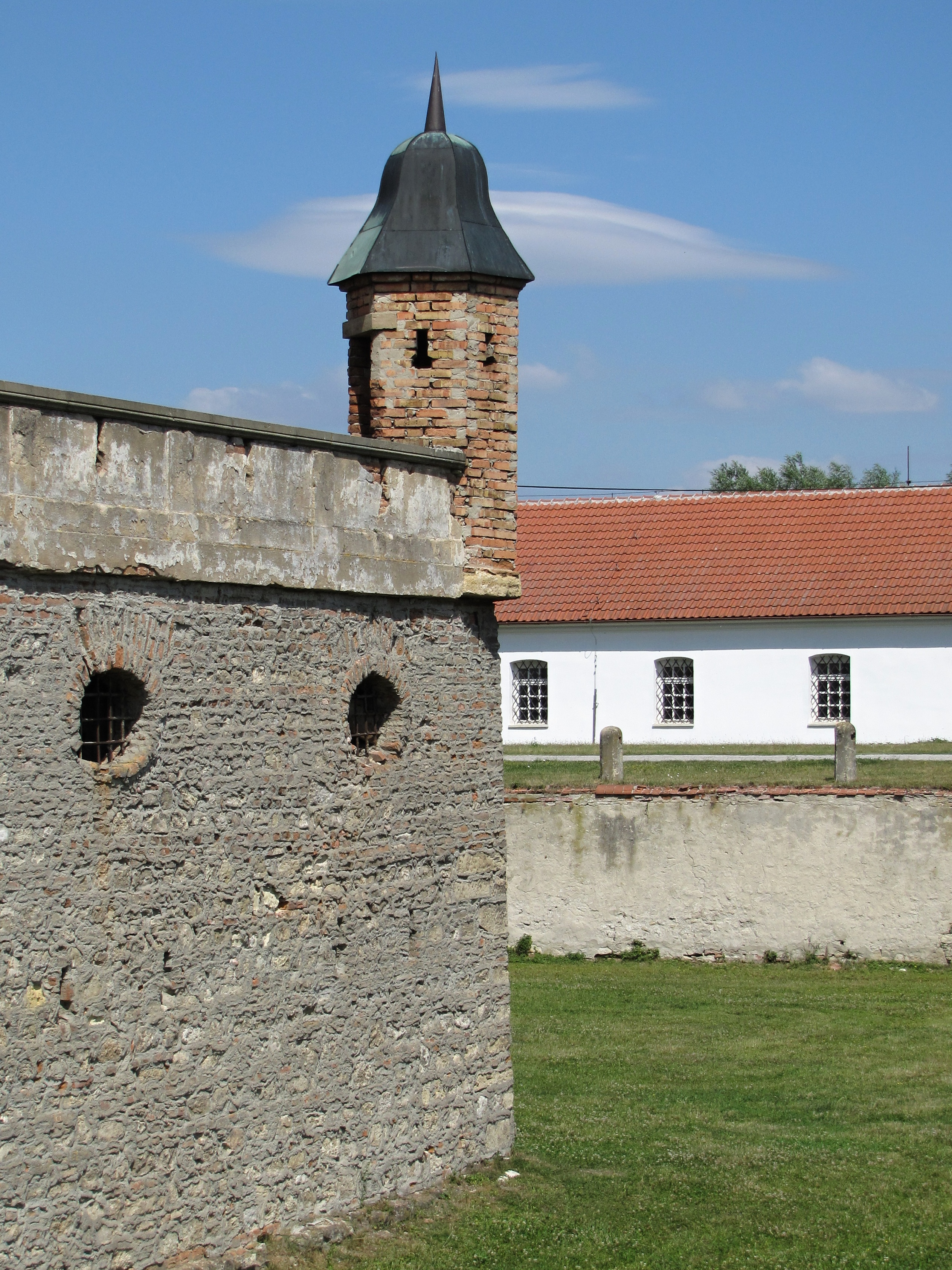 Holíčský zámek